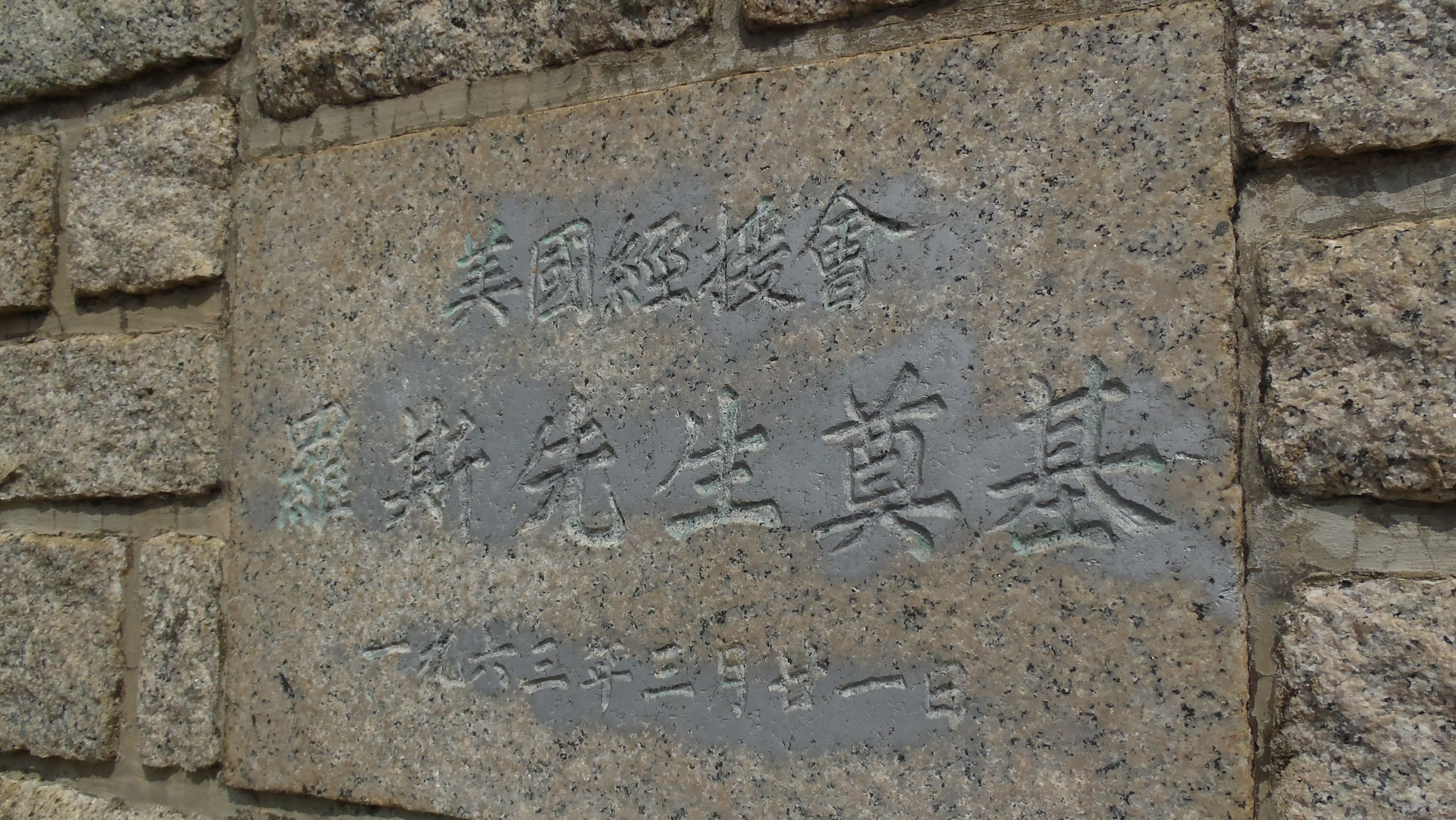 中文（香港）: 高流灣村公所奠基碑石 2016